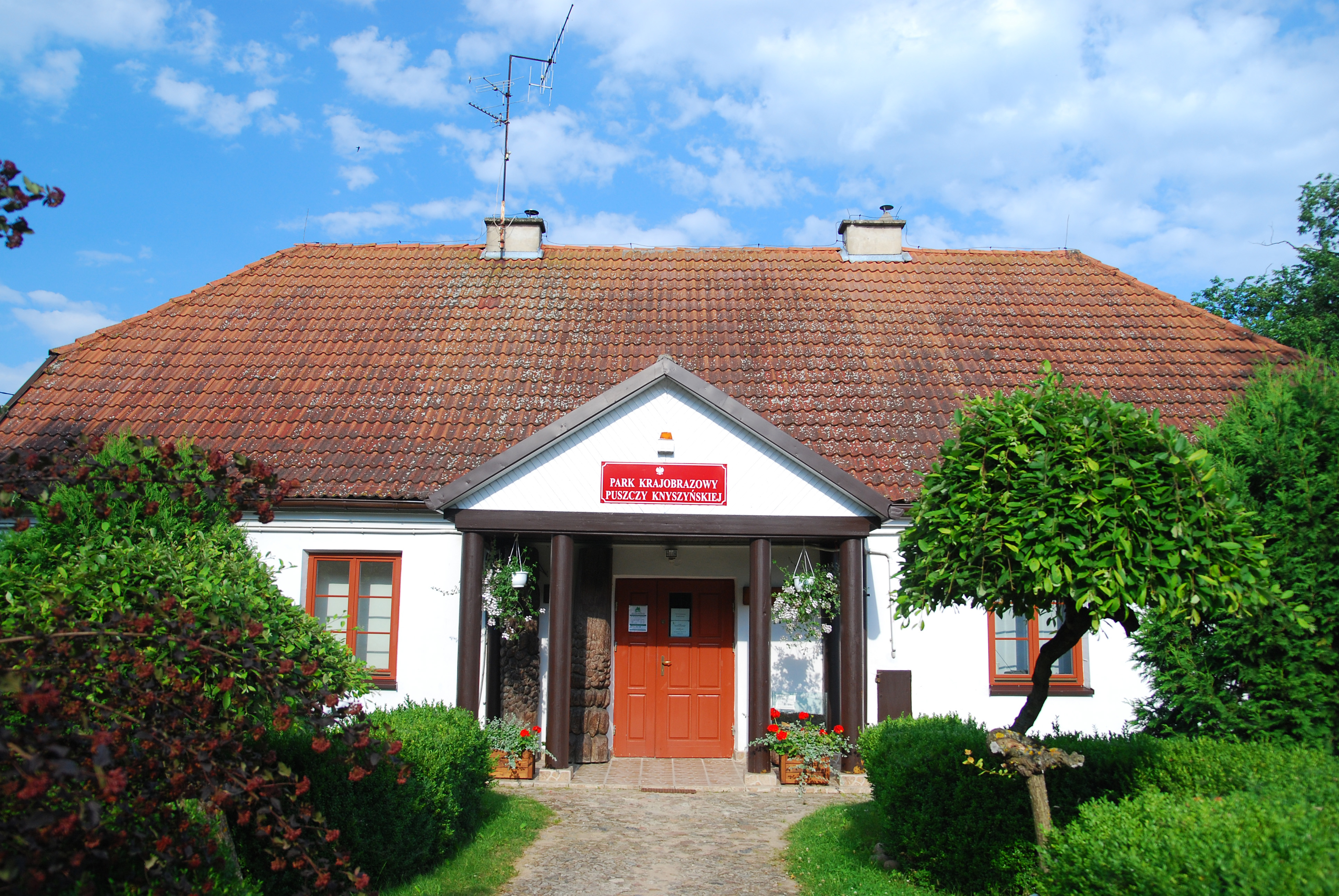 Supraśl, ul. Konarskiego 14 (dawniej 10) - dom, obecnie siedziba zarządu Parku Krajobrazowego Puszczy Knyszyńskiej (zabytek nr 212 z 21.10.1966) This photo from Podlaskie Voievodeship was taken during Polish Wikiexpedition 2009 set up by Wikimedia Polska Association. The making of this document was supported by Wikimedia Polska.